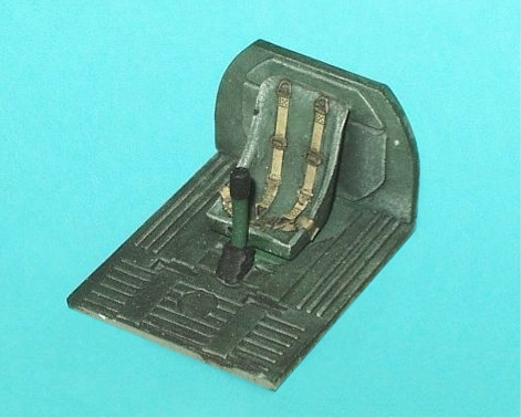 Przykład wydobywania cieni w kabinie pilota przy pomocy farby plakatowej